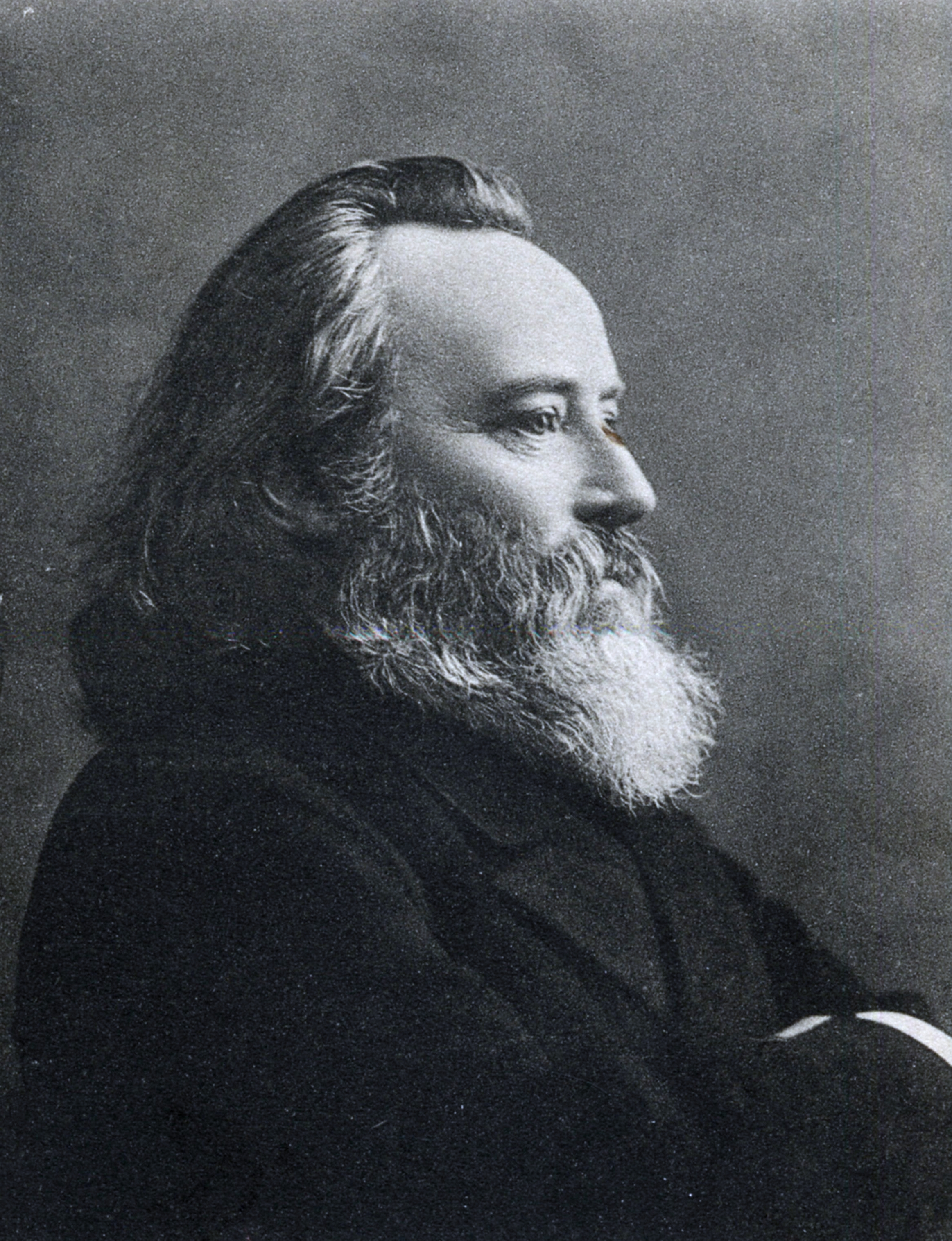 Кареев, Николай Иванович